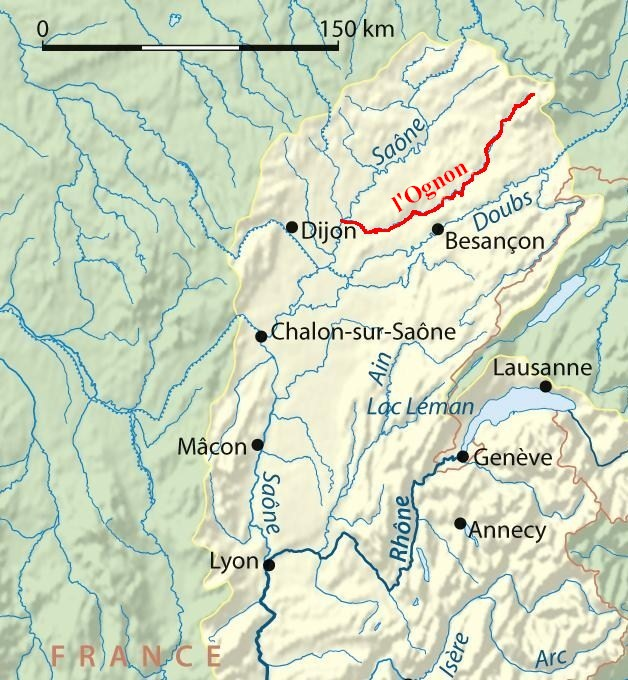 surligné du cours de la rivière Ognon (affluent de la Saône) - France